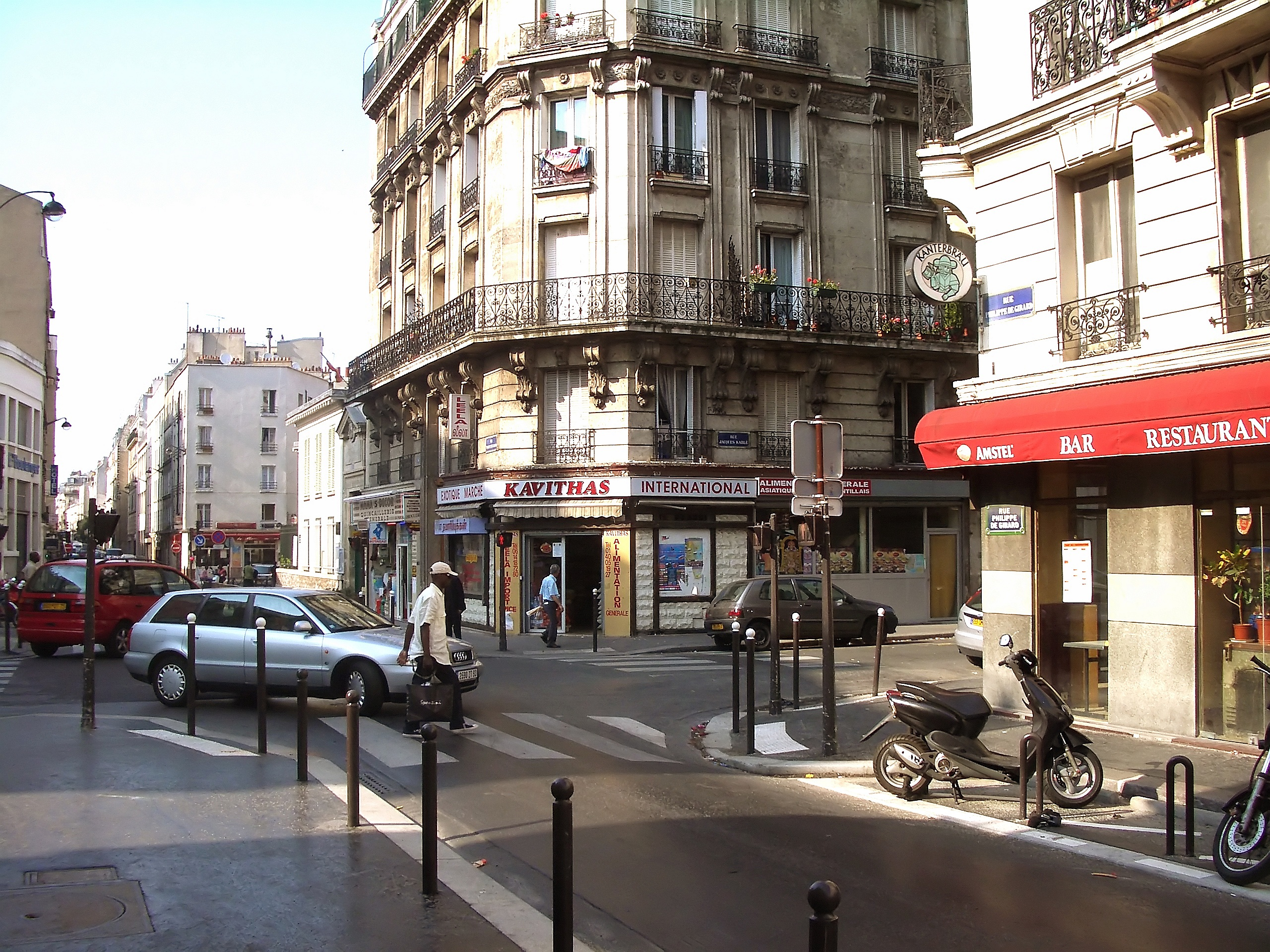 Summary Le carrefour entre rue Jacques Kablé et rue Philippe de Girard and le quartier parisien de la chapelle. Photo prise en mi-juillet. Modifiée pour regler le contraste, etc.